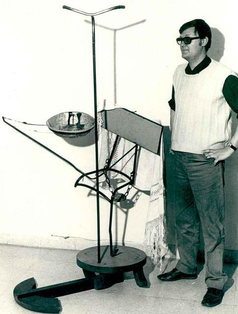 Edgardo Vigo junto al Palanganómetro Mecedor para críticos de arte